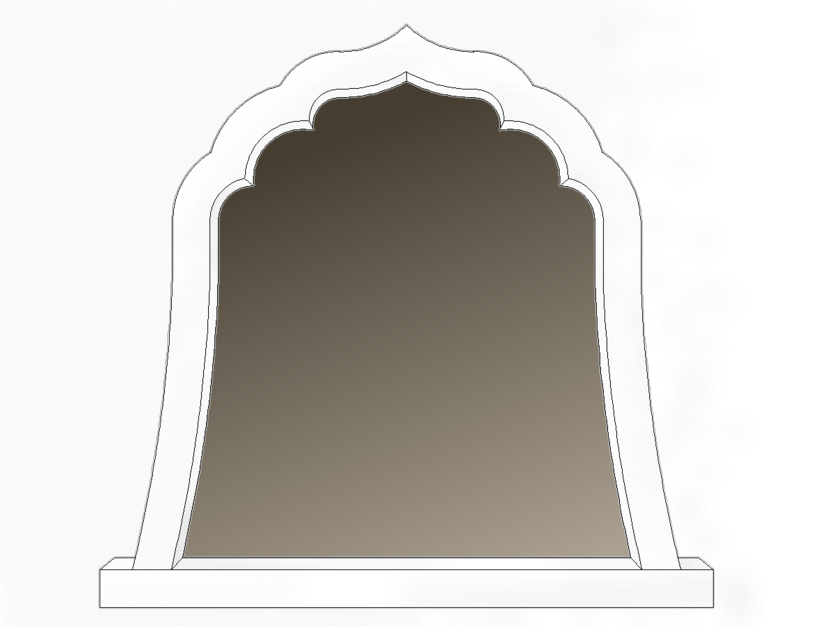 2008.1.15に投稿者によって作成された華頭窓の図例。 Description 華頭窓の図例 なしOther versions 他のバージョンがある場合、ここにそのファイルへのリンクなど） 華頭窓の図例